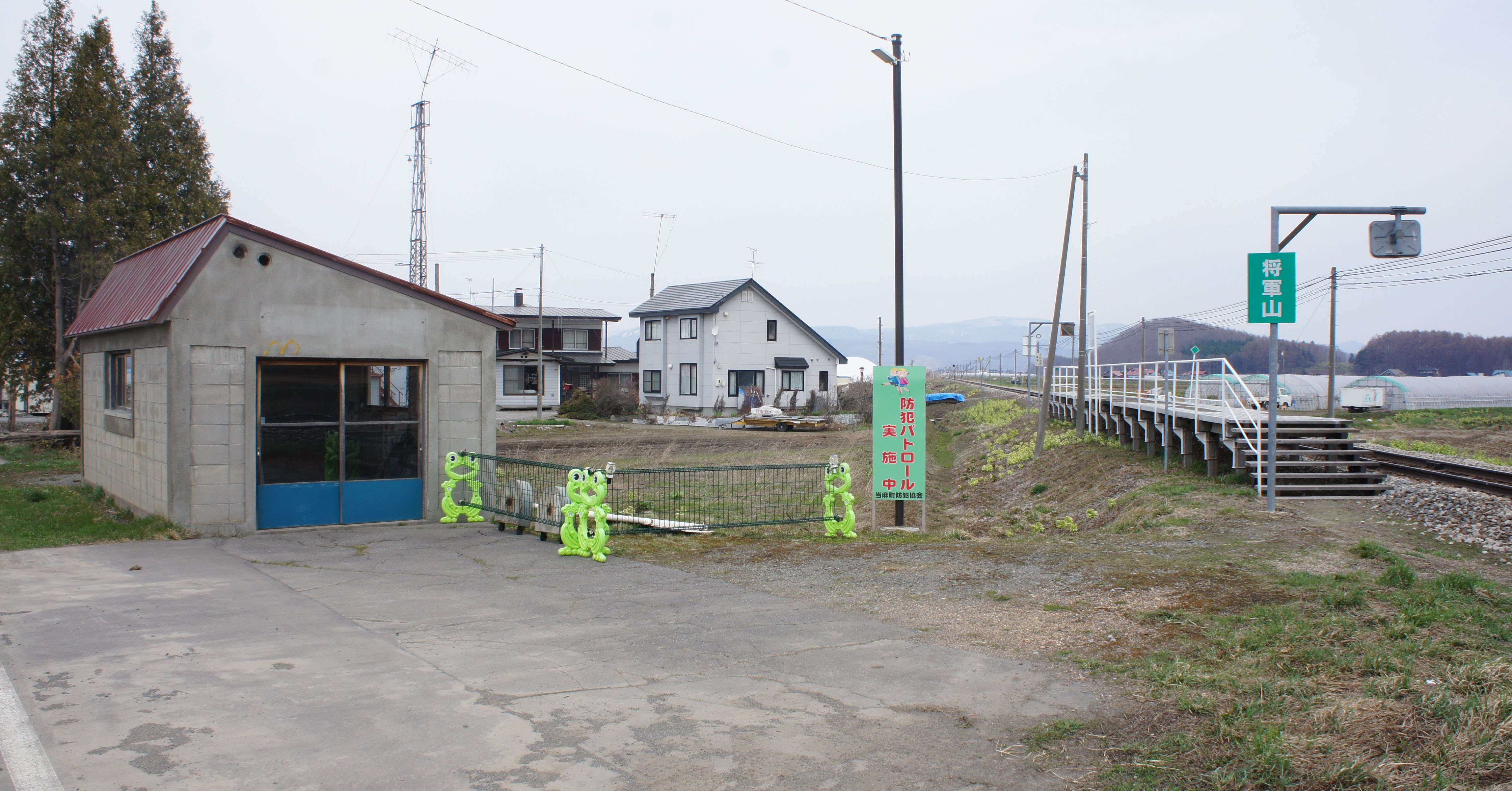 JR石北本線・将軍山駅全景